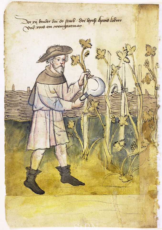 hans (Hans) ledrer (Lederer) , weingartman (Winzer) Transkription und weitere Informationen